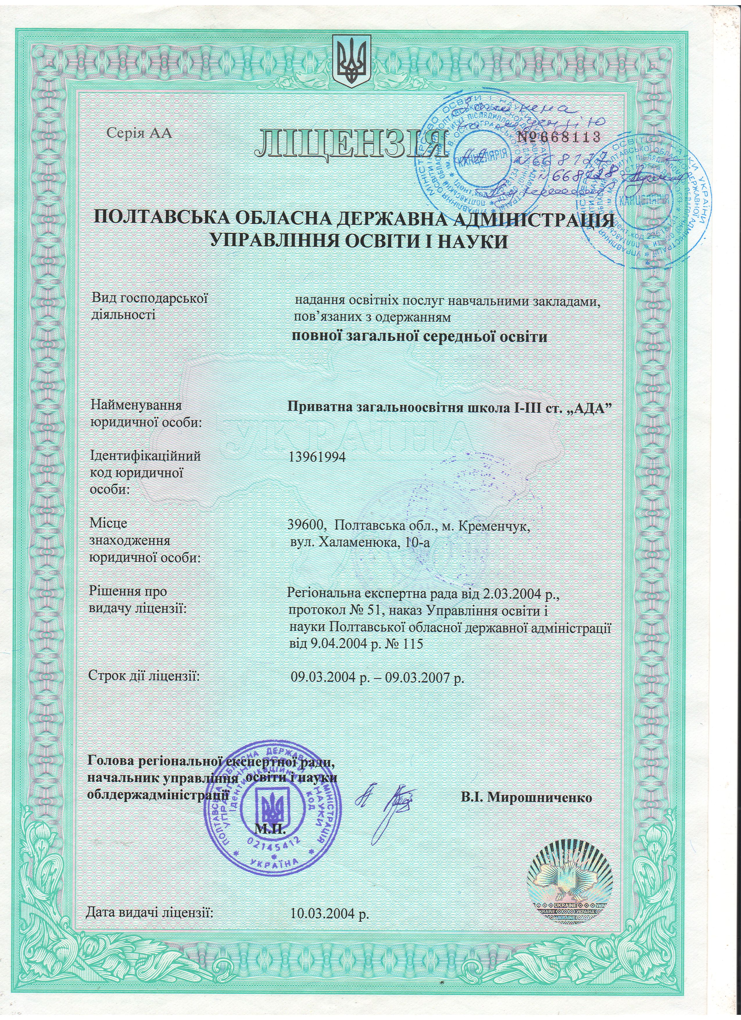 Лицензия на осуществление учебной деятельности, выданная школе "Ада" (Кременчуг, Украина)